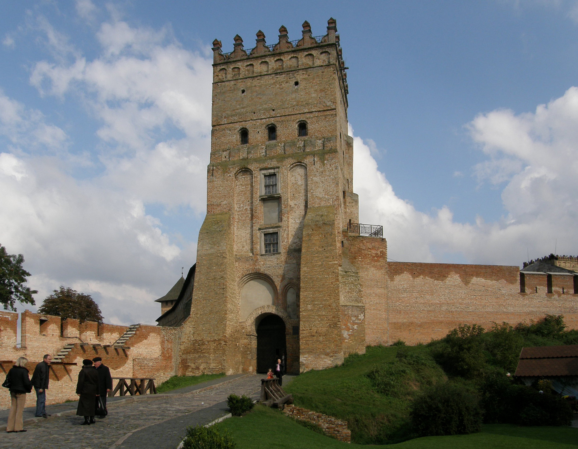 Burg Lubarta in Luzk